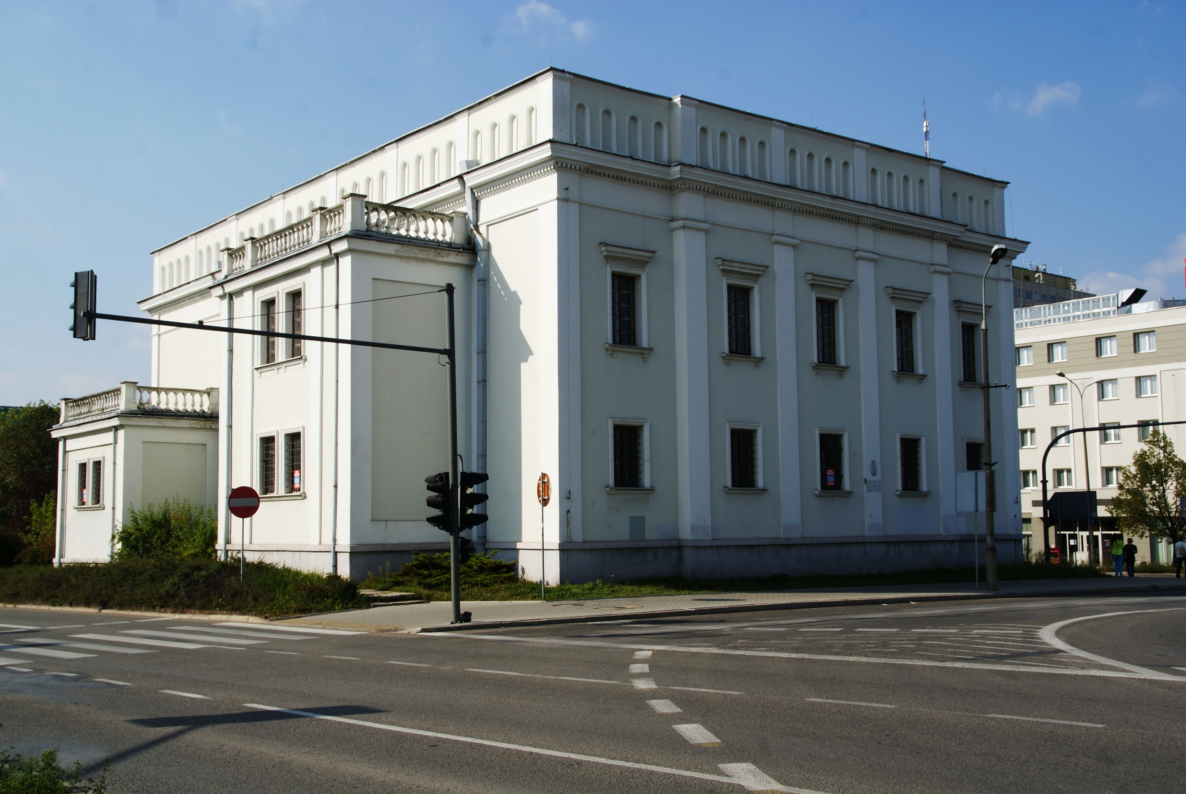 Synagoga Kielce ul. Warszawska 17, Kielce 328 z 14.07.1987.